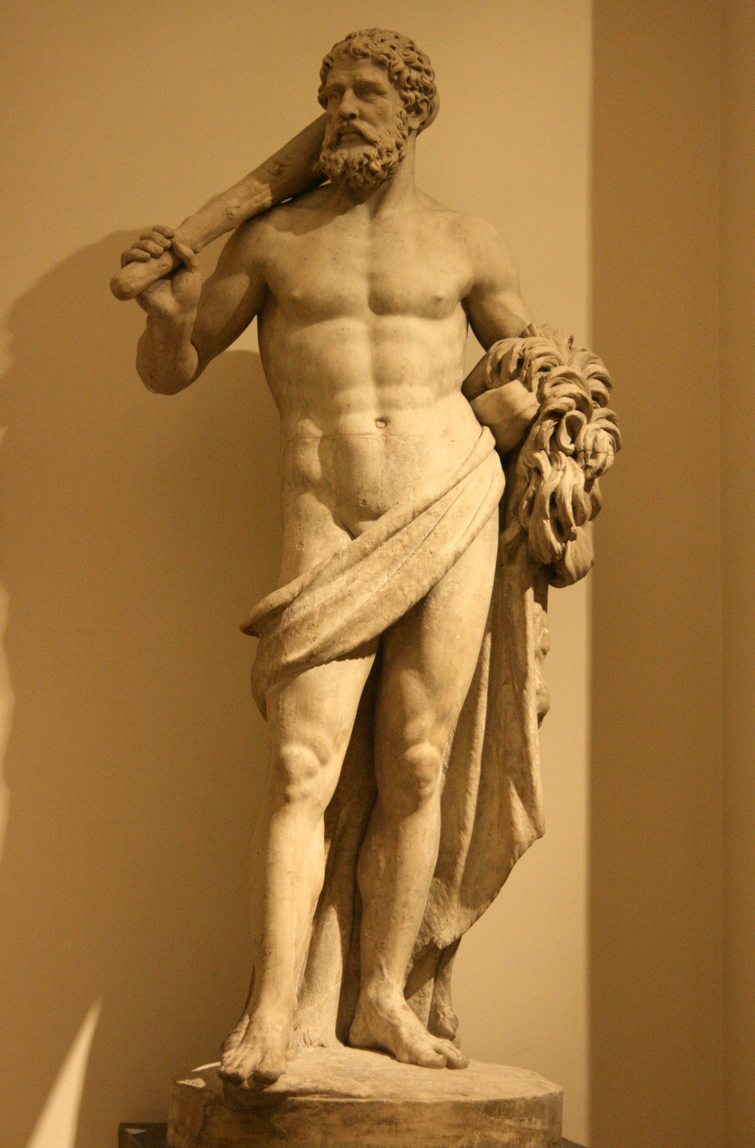 Statue d'Hercule par Gilles-Lambert Godecharle, Musées royaux des Beaux-Arts de Belgique, Bruxelles (Belgique)